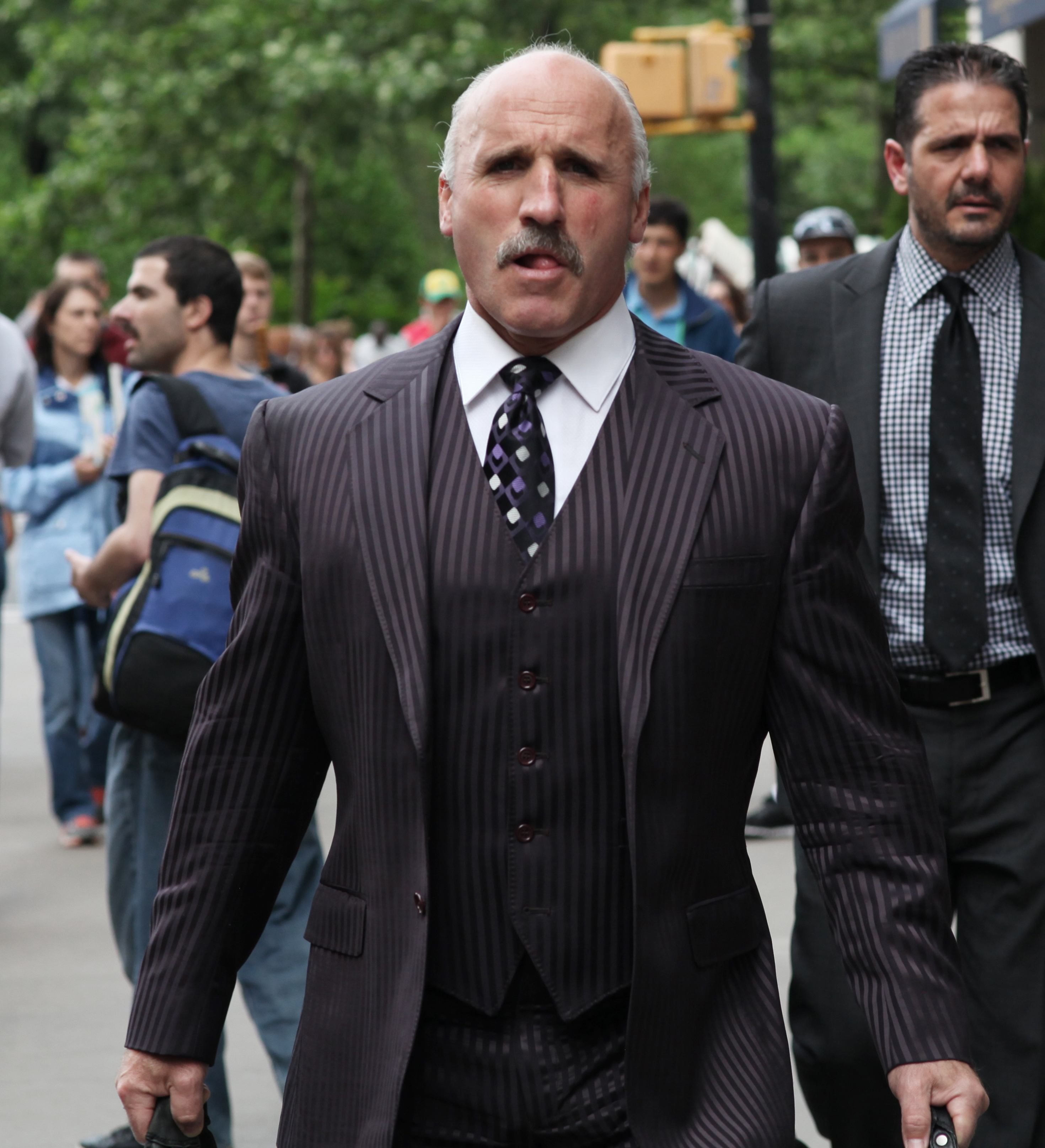 Daryl Evans in June 2014.